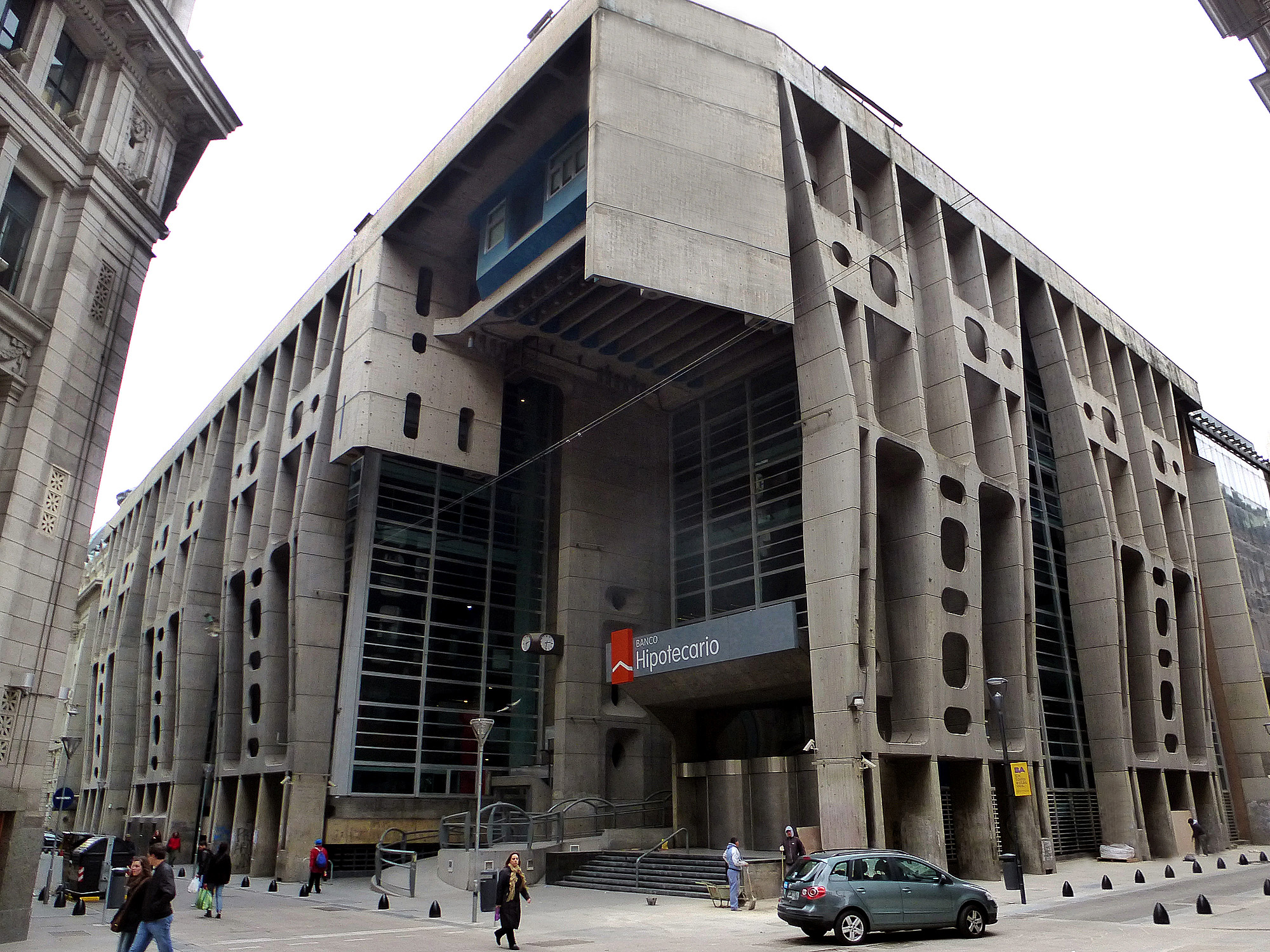 Banco Hipotecario S.A.